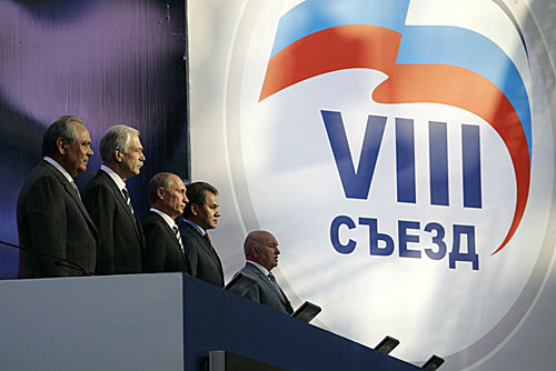 1 октября 2007 года. Москва, Гостиный двор. На съезде партии «Единая Россия». Слева направо: Президент Татарстана Минтимер Шаймиев, Председатель Государственной Думы Борис Грызлов, Президент России Владимир Путин, глава МЧС Сергей Шойгу, мэр Москвы Юрий Лужков.